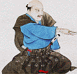 滝川一益(Takigawa Kazumasu)